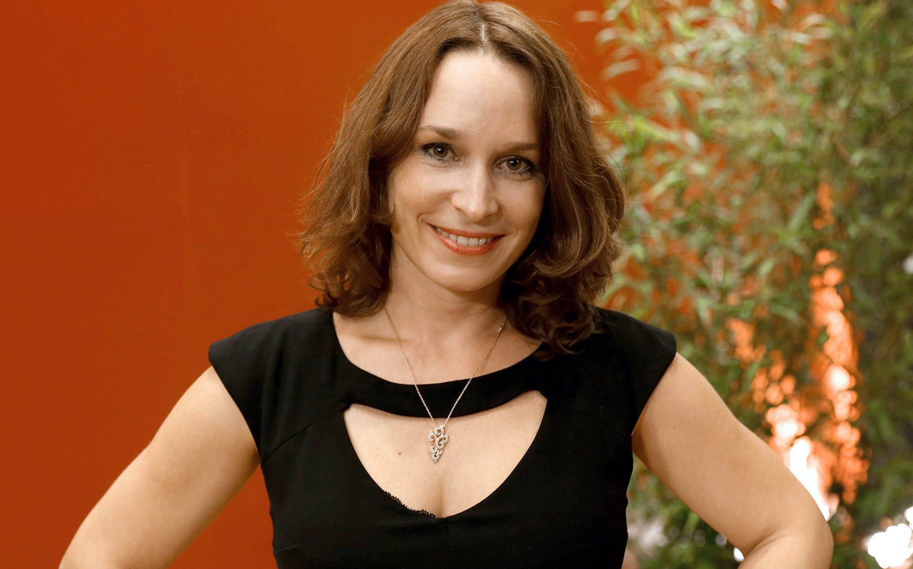 Mirjam Unger - Nestroy-Theaterpreis 2013 in der Halle F der Wiener Stadthalle (Wien, Österreich).